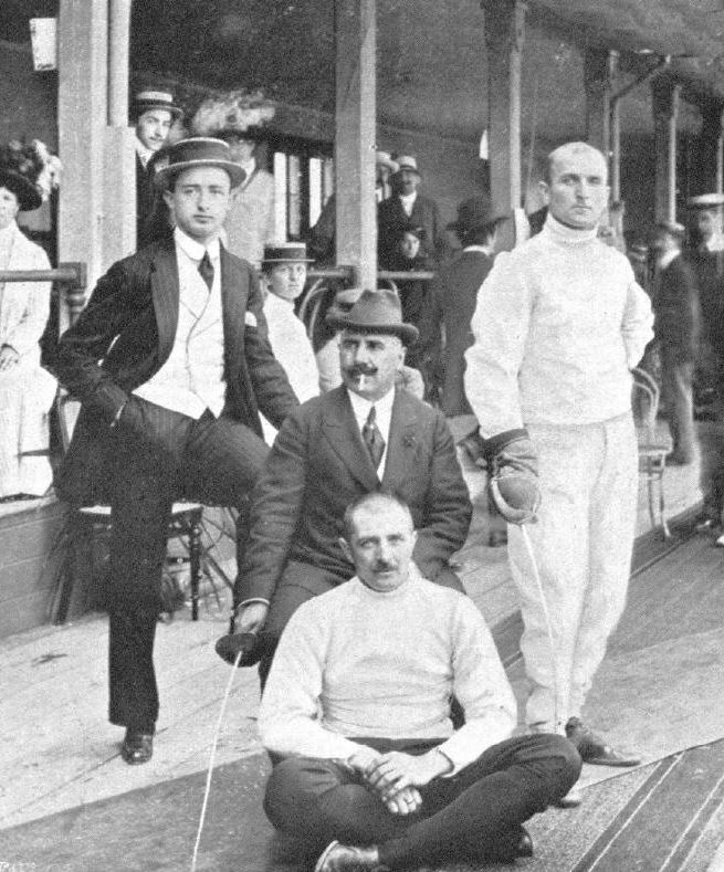 Die österreichische Equipe beim internationalen Fechtturnier am Lido: Béla Békéssy, Maestro Luigi Della Santa, George M. Tafler, Ernst Königsgarten (v.l.n.r.)